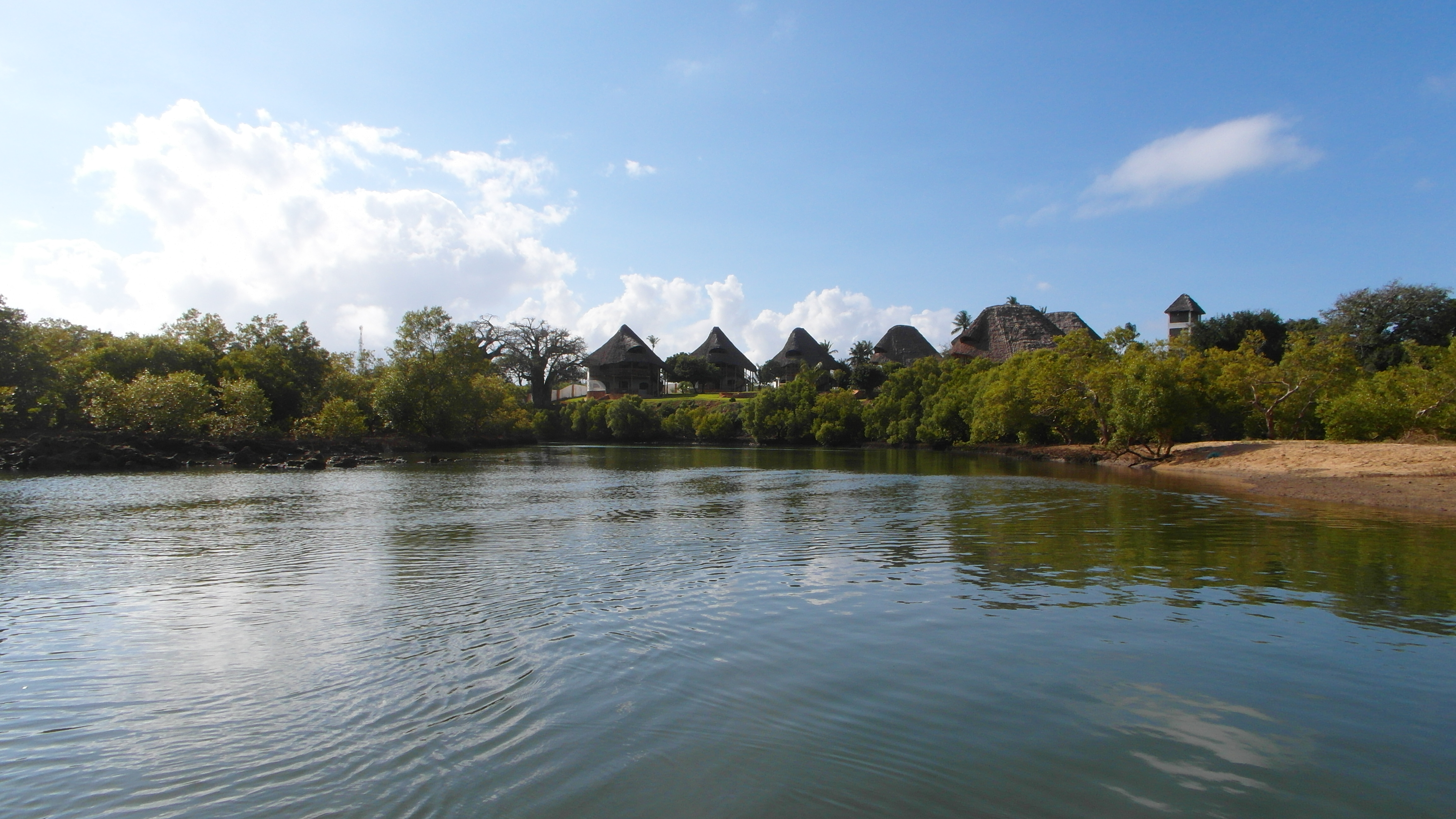 Kongo River, Diani Beach 2013